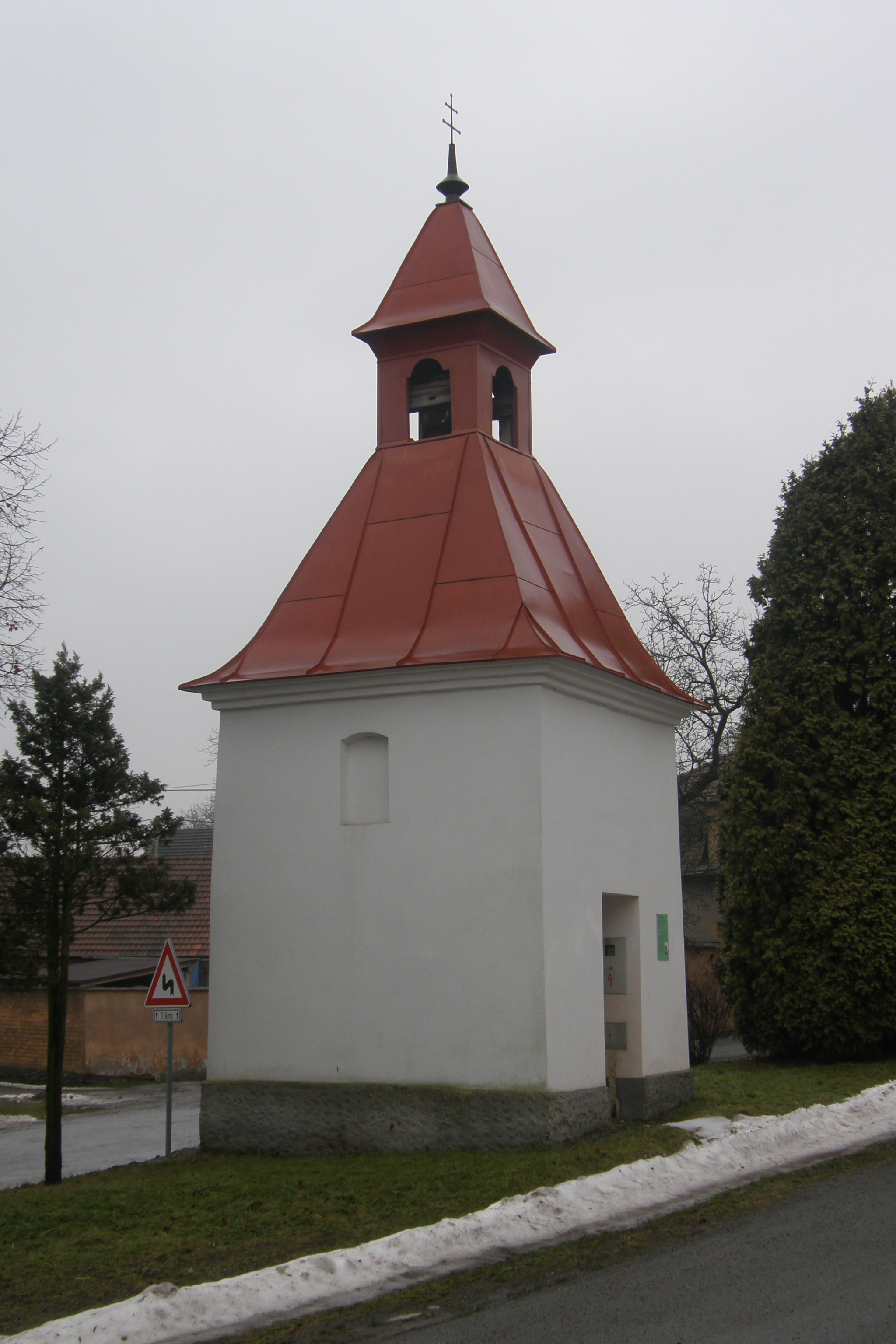 Kaple v Drvalovicích